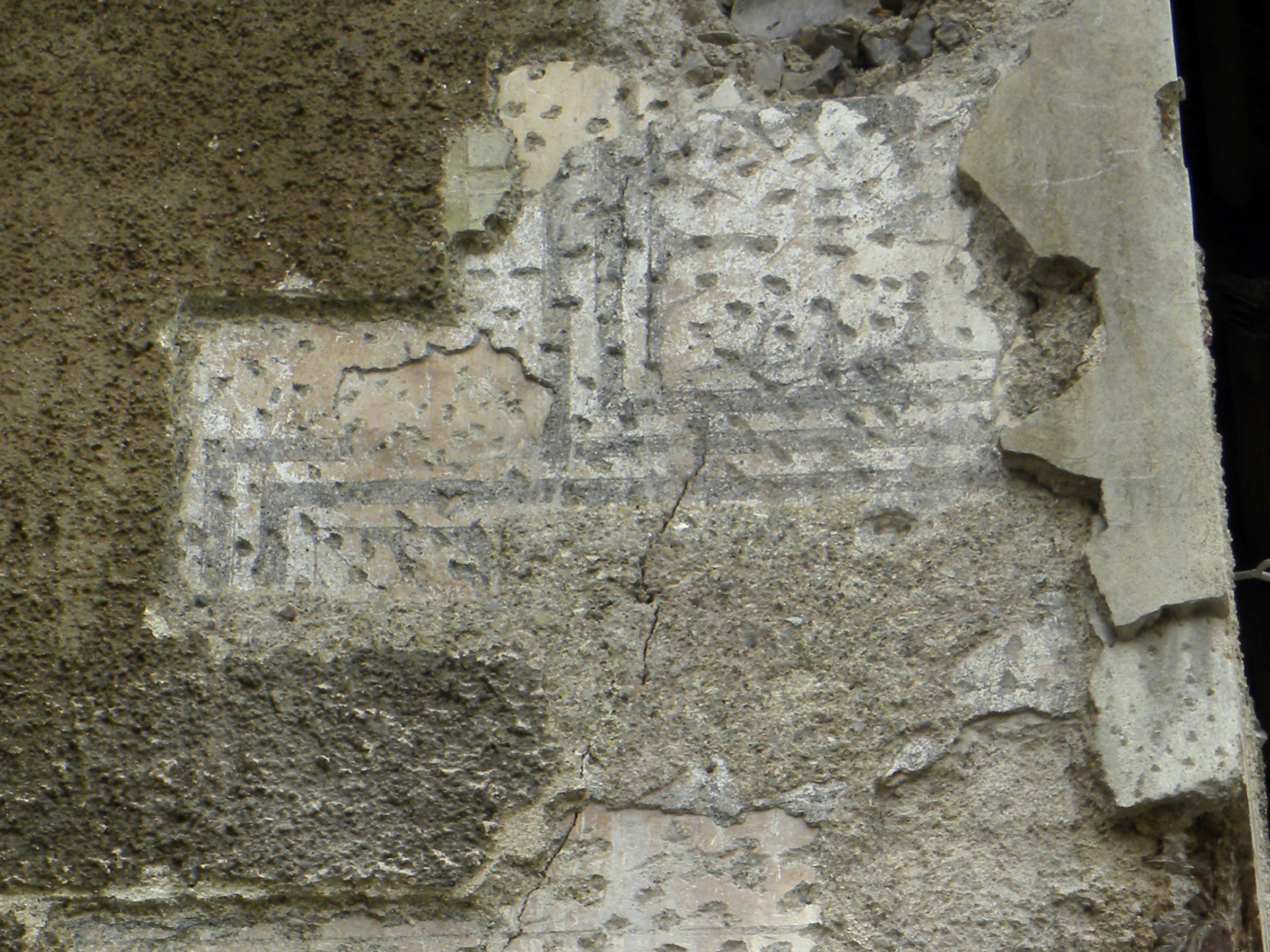 Schwarzer Hof - Sgraffitoreste